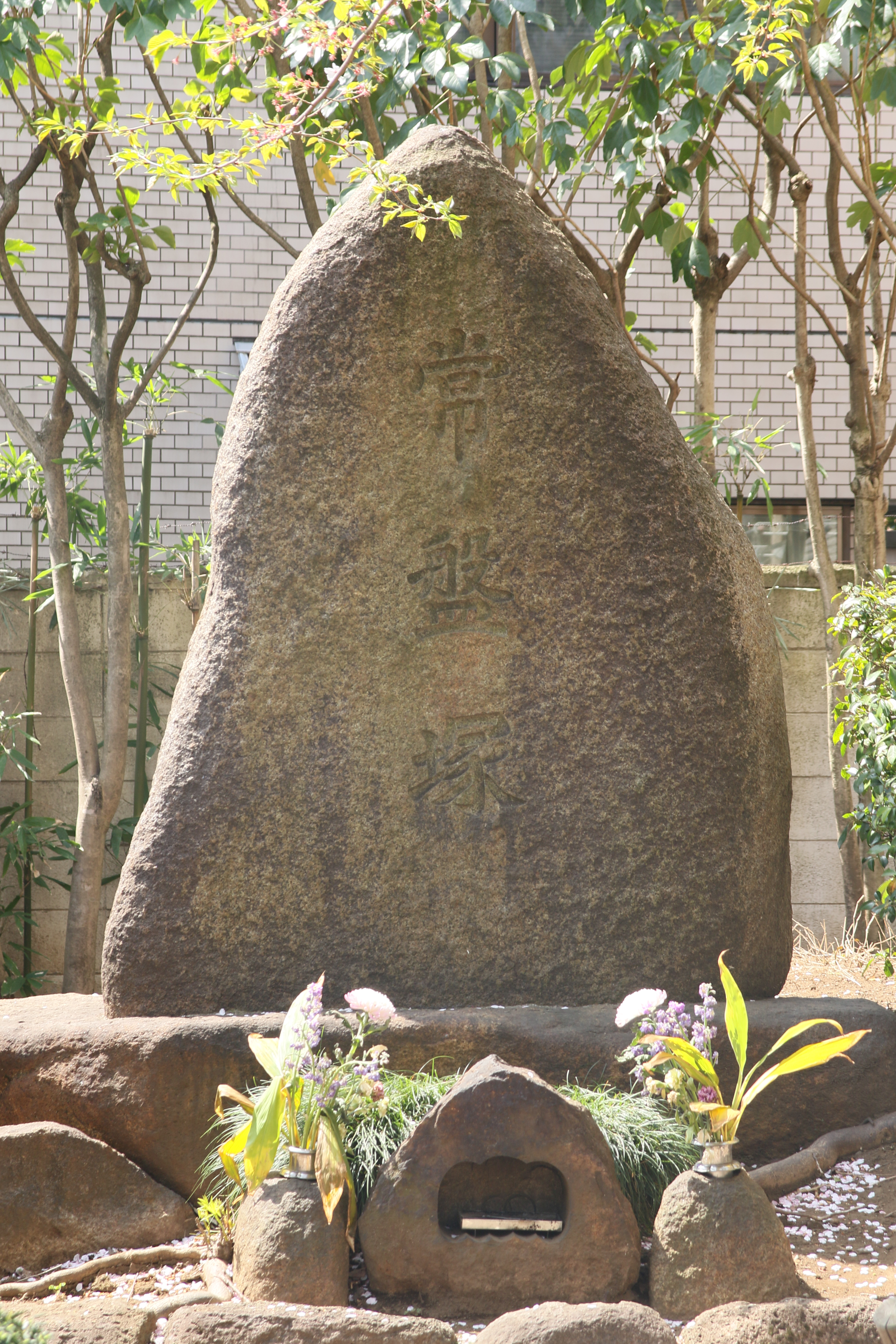 東京都世田谷区にある常盤塚の碑